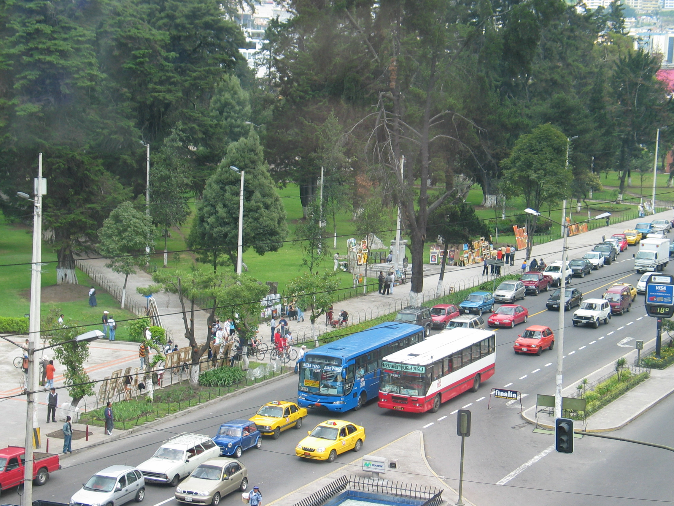 Quito, Ecuador